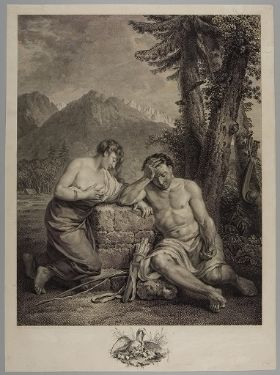 gravure